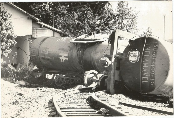 Descarrilhamento de um trem no entrocamento da Estação de Bongaba.